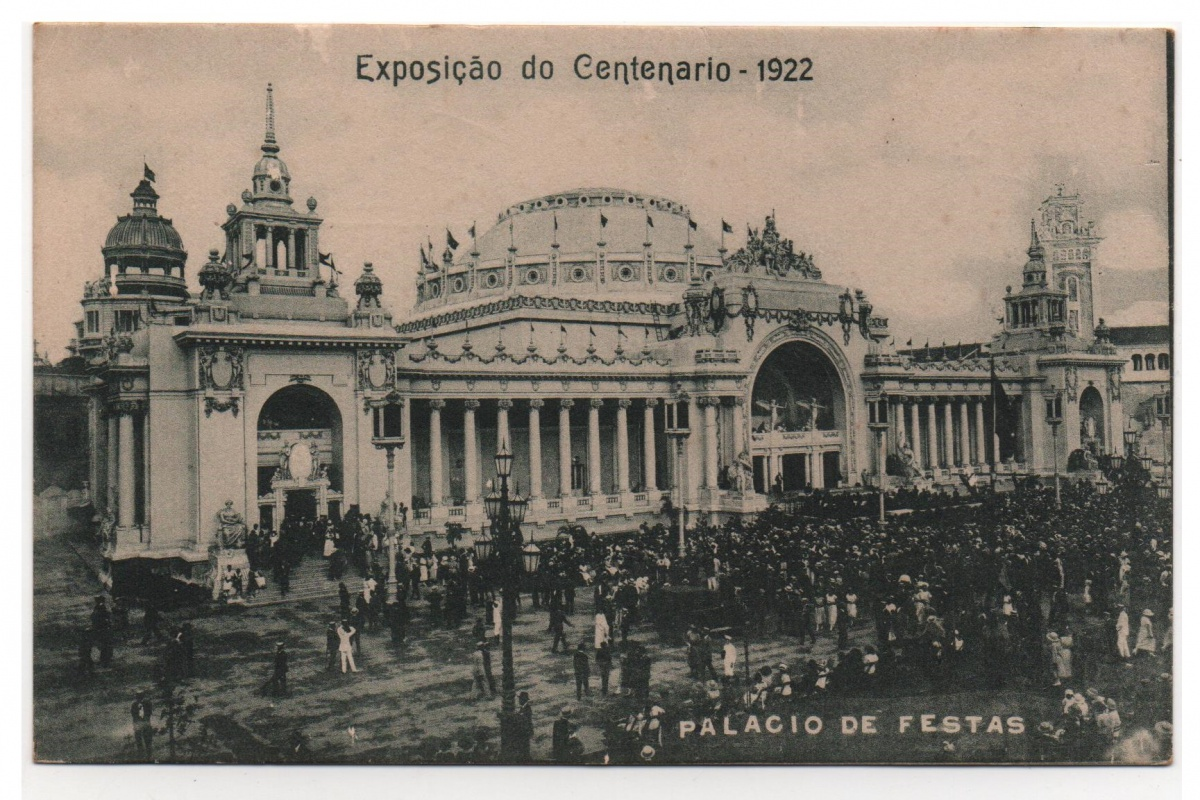 Foto do pavilhão de festas no Rio de Janeiro durante a exposição internacional de 1922.